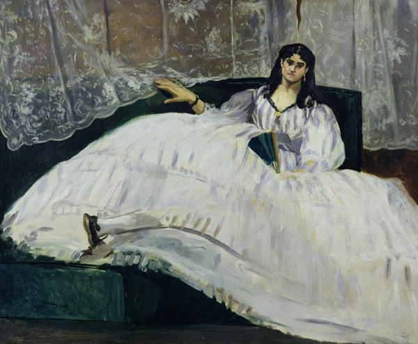 Baudelaire's Mistress, Reclining represents Jeanne Duval, mistress of Charles Baudelaire